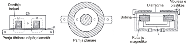 Elektromagnetizmi